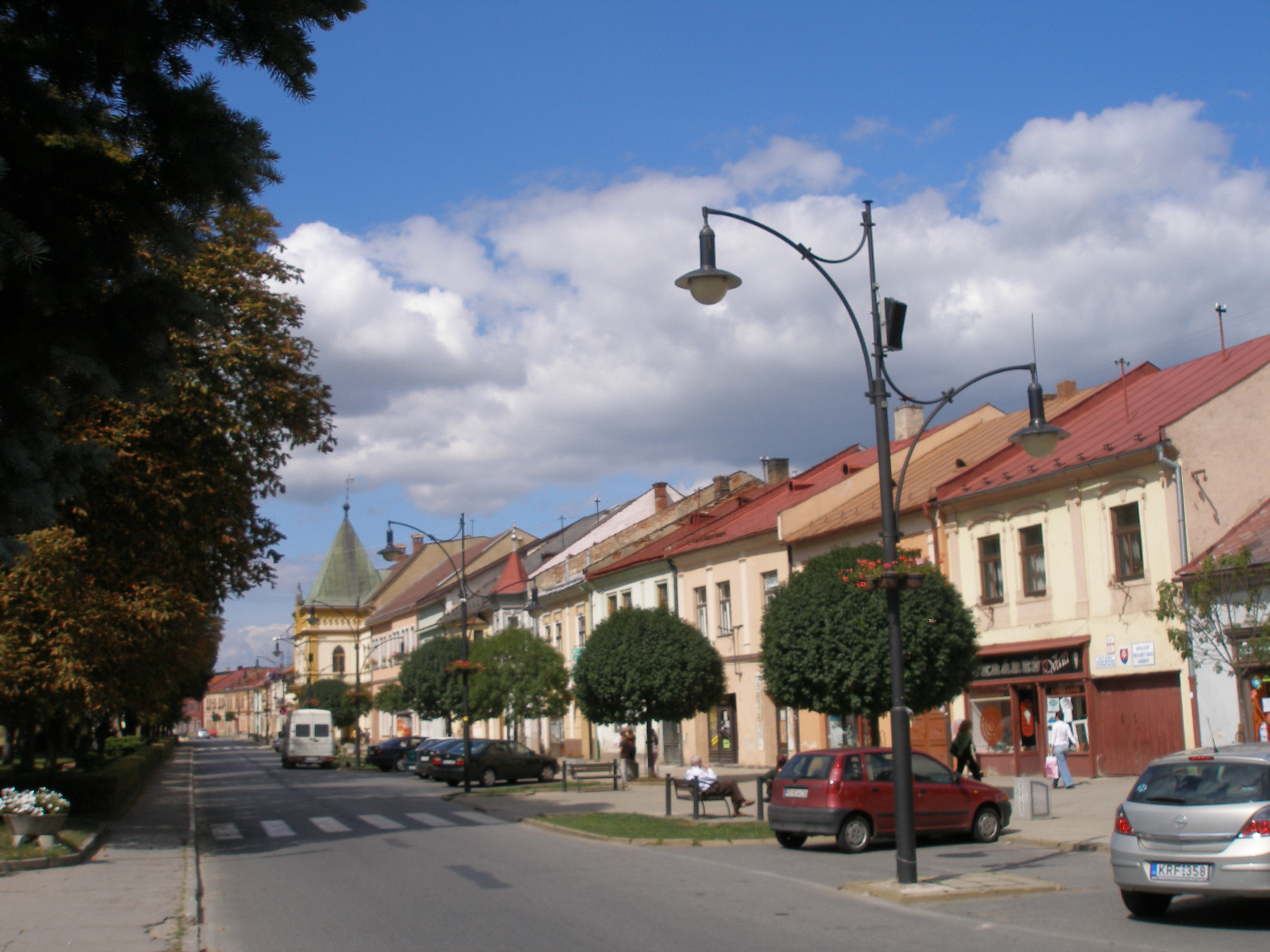 Sabinov starobylé bývalé slobodné kráľovské mesto na Slovensku. Dnes okresné mesto v regióne Šariš.